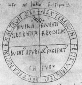 Rota dal privilegio di Guglielmo I re di Sicilia a favore dellc Chiesa Palermitana, giugno 1159